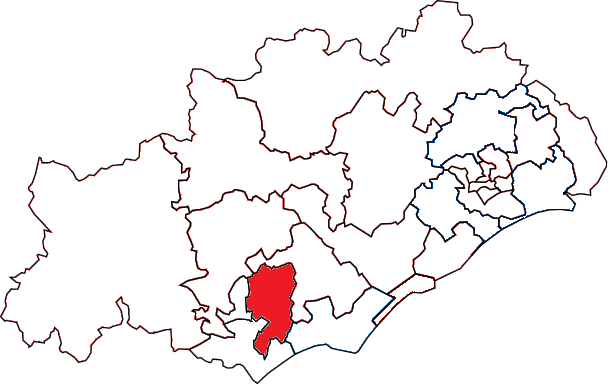 Situation du canton dans le département de l'Hérault